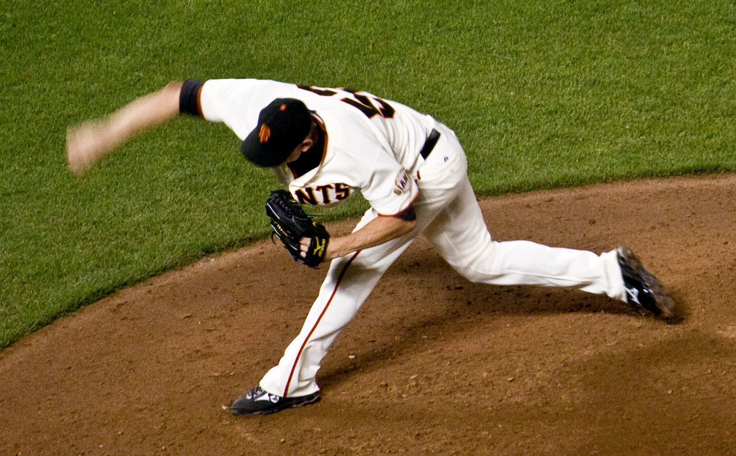 Brandon Medders